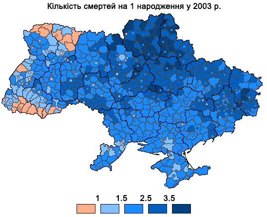 Death to birth rate in Ukraine, 2003